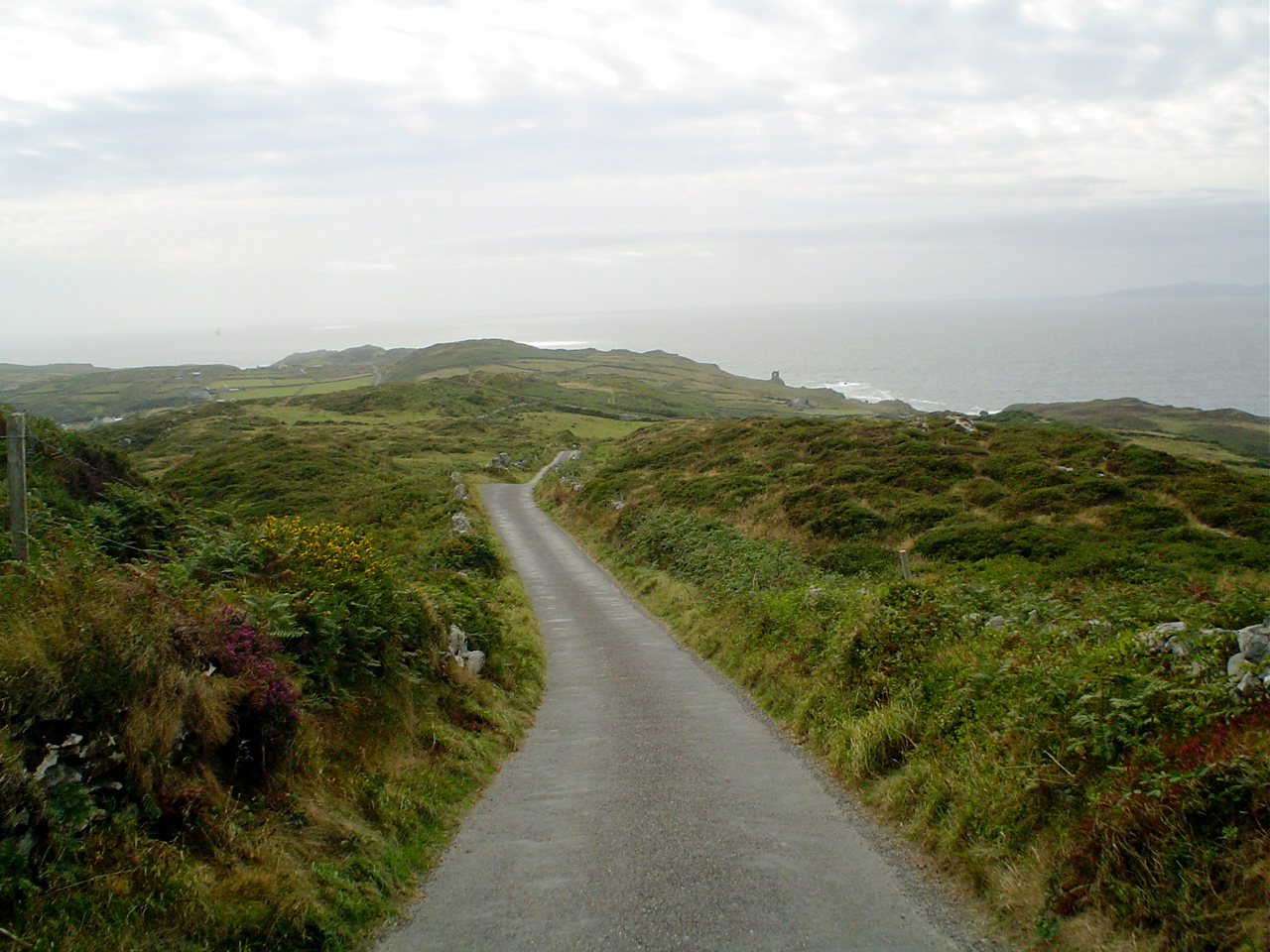 Cape Clear landscape